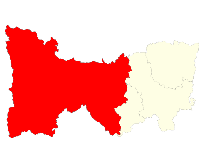 Localisation du district d'Ambatofinandrahana dans la région Amoron'i Mania